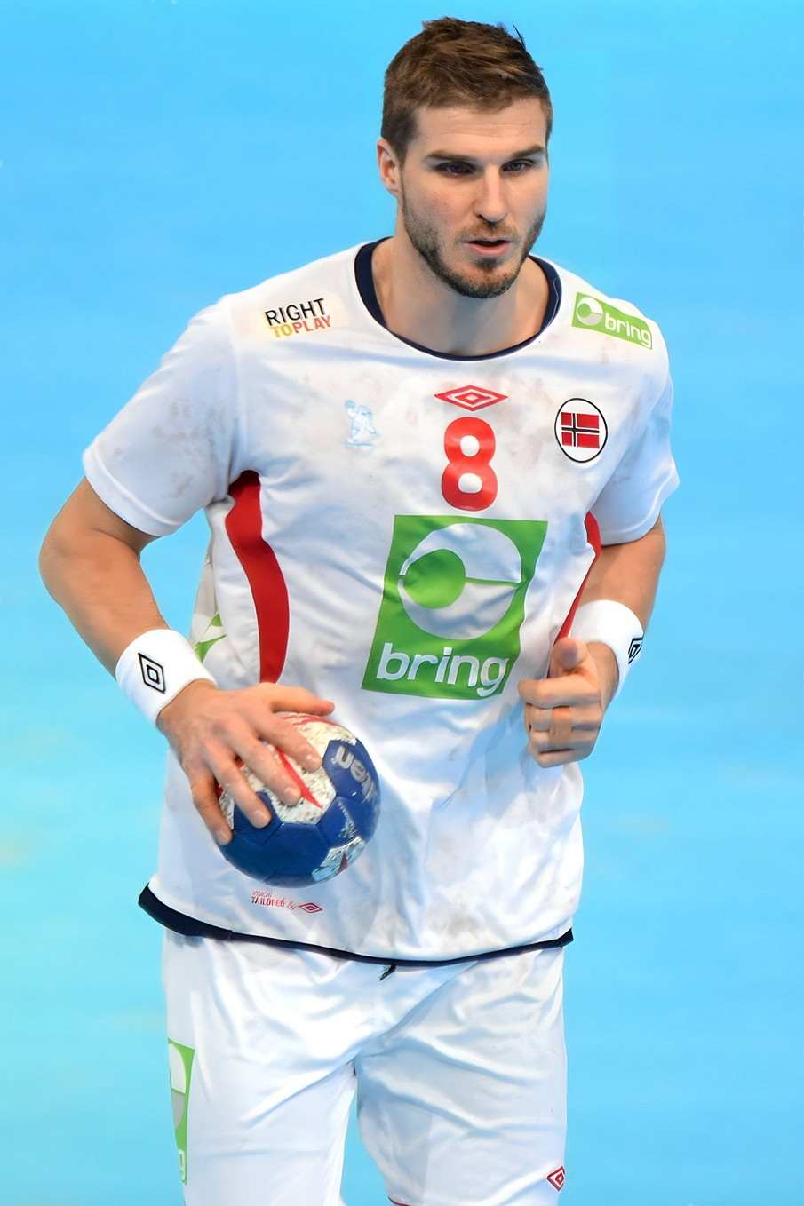 Bjarte Myrhol , le 10 janier 2016 lors du match Norège / Qatar durant la Golden League à l'AccordHotel Arena (Paris).